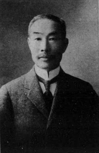 横田秀雄（1862-1938）